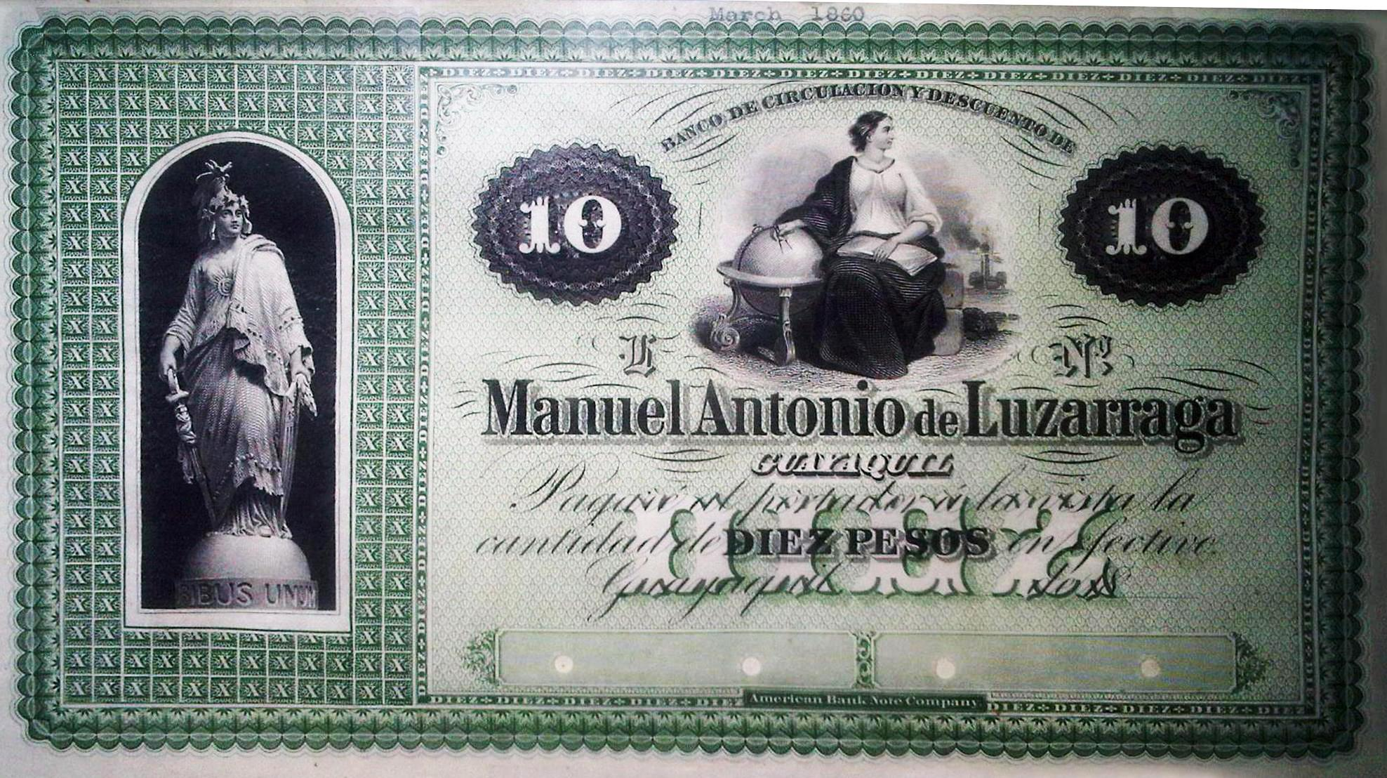 Uno de los billetes impresos en Londres 1860 para la Casa de Luzárraga, actualmente exhibidos en el Museo de la Moneda del Banco de Guayaquil.